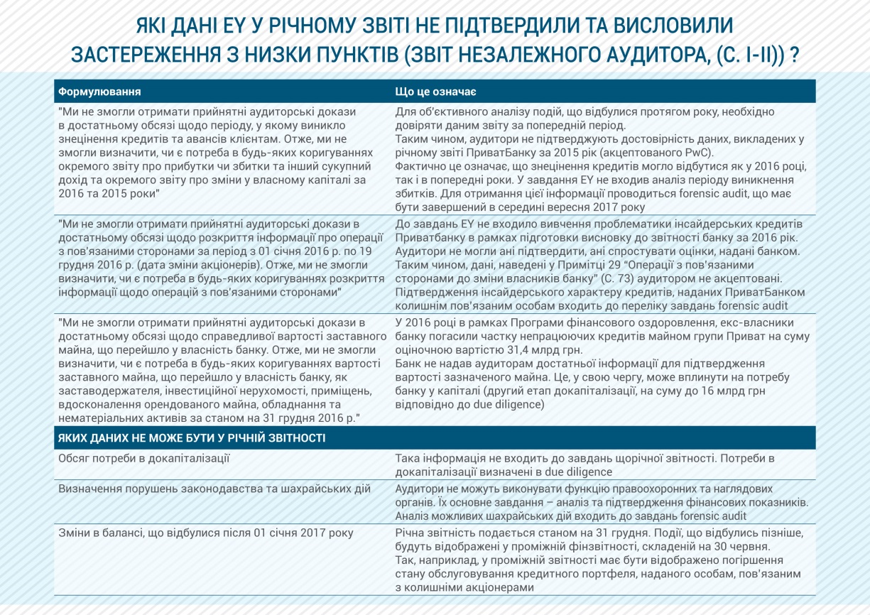 Які дані E&Y у річному звіті не підтвердили та висловили застереження з низки пунктів